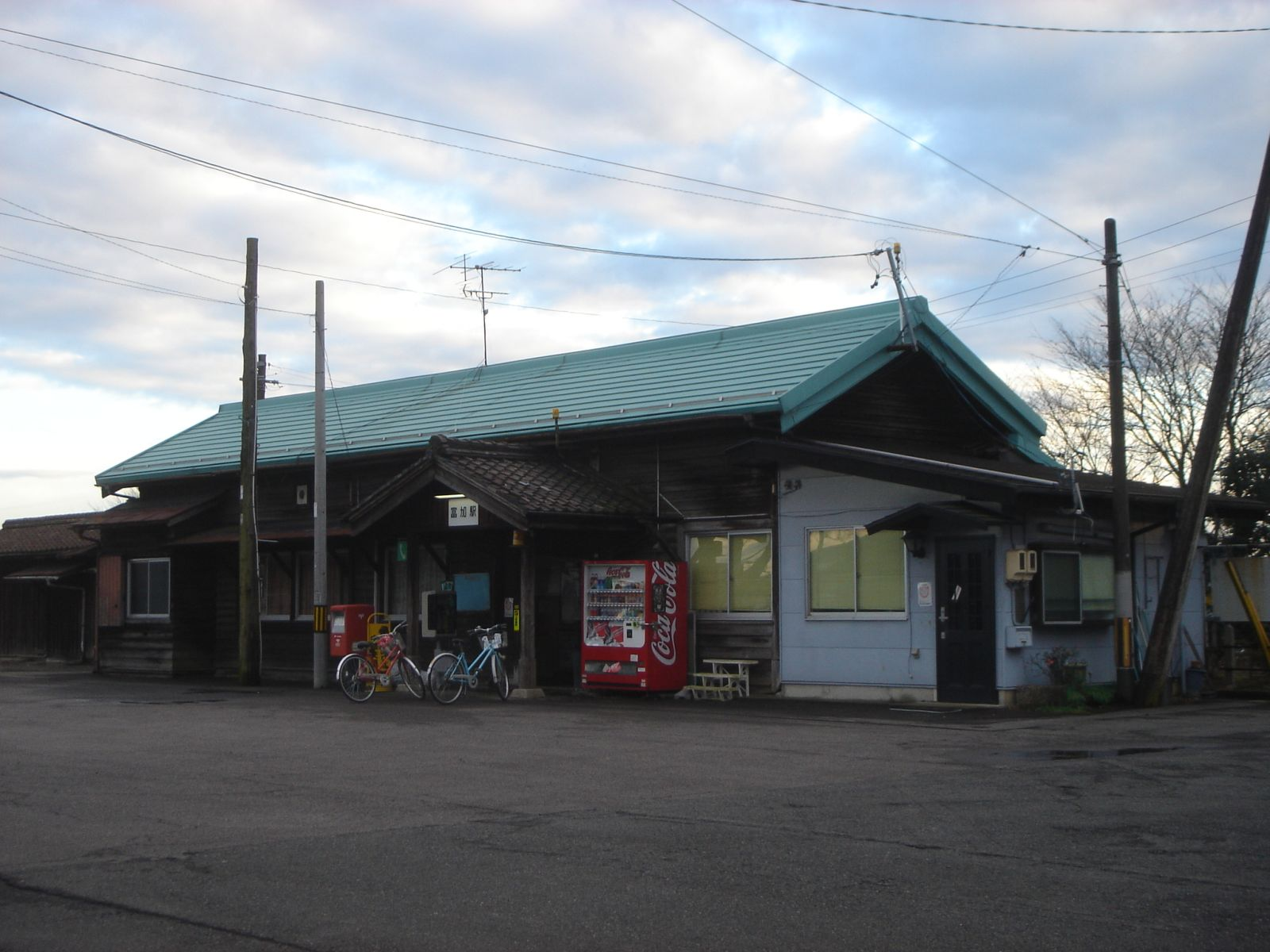 Tomika Station (長良川鉄道越美南線、富加駅）,Tomika,Gifu,Japan(岐阜県富加町)で撮影。